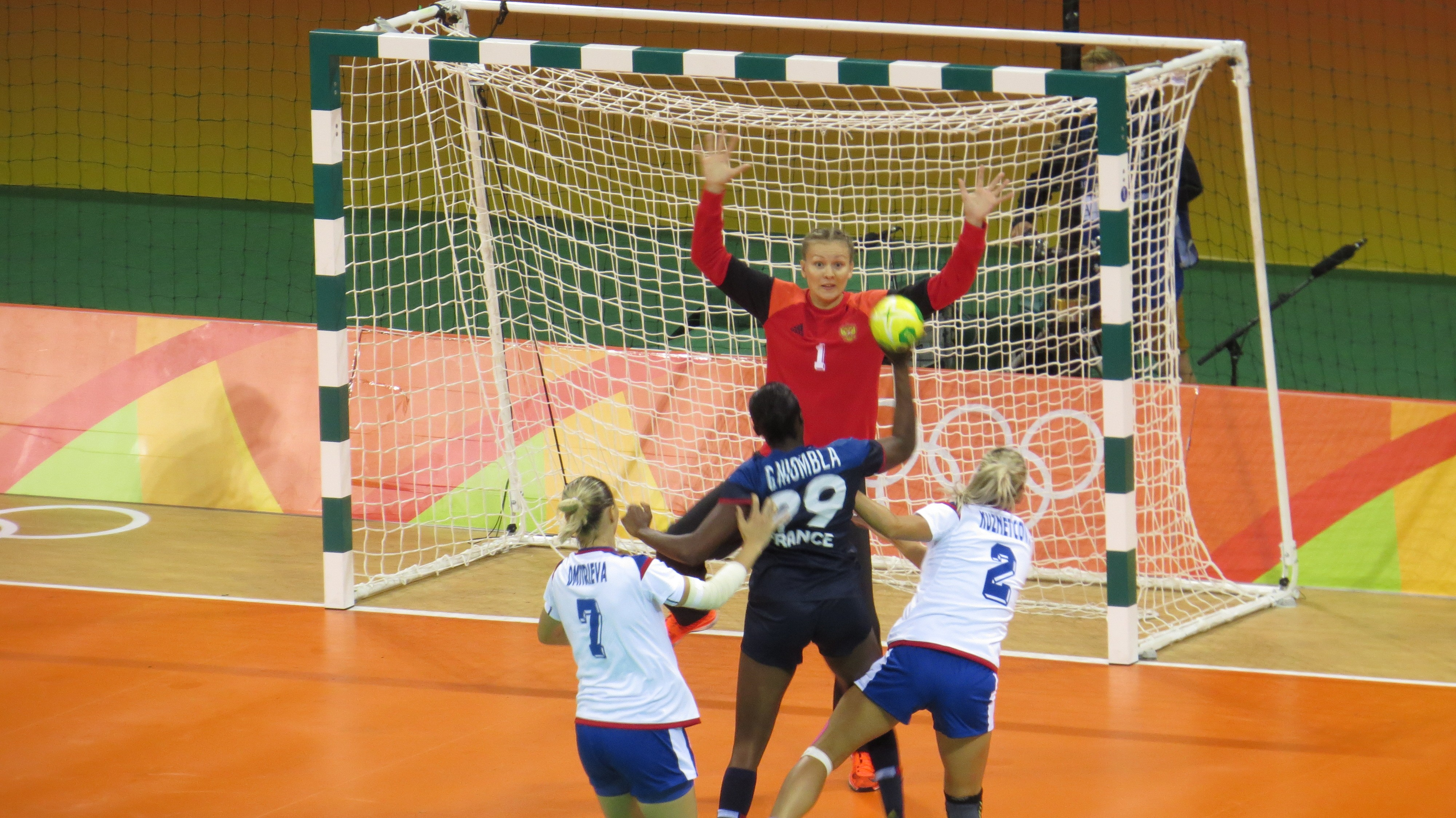 Rio 2016. sx 99